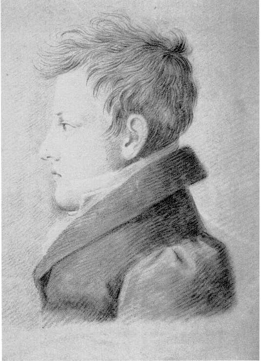 Friedrich Günther, Prince of Schwarzburg-Rudolstadt (6 November 1793 - 28 June 1867)